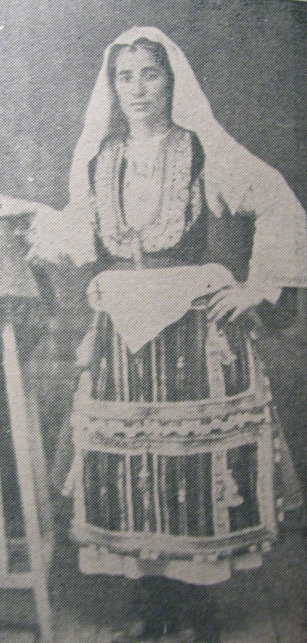 Женска народна носия от Радожда.